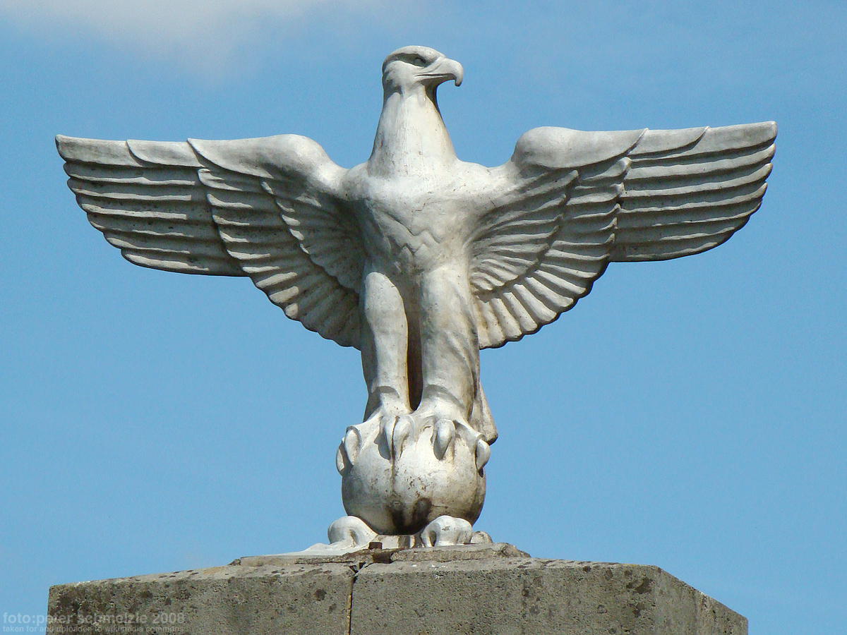 Detail vom Kriegerdenkmal bei der evang. Kirche in Heilbronn-Frankenbach